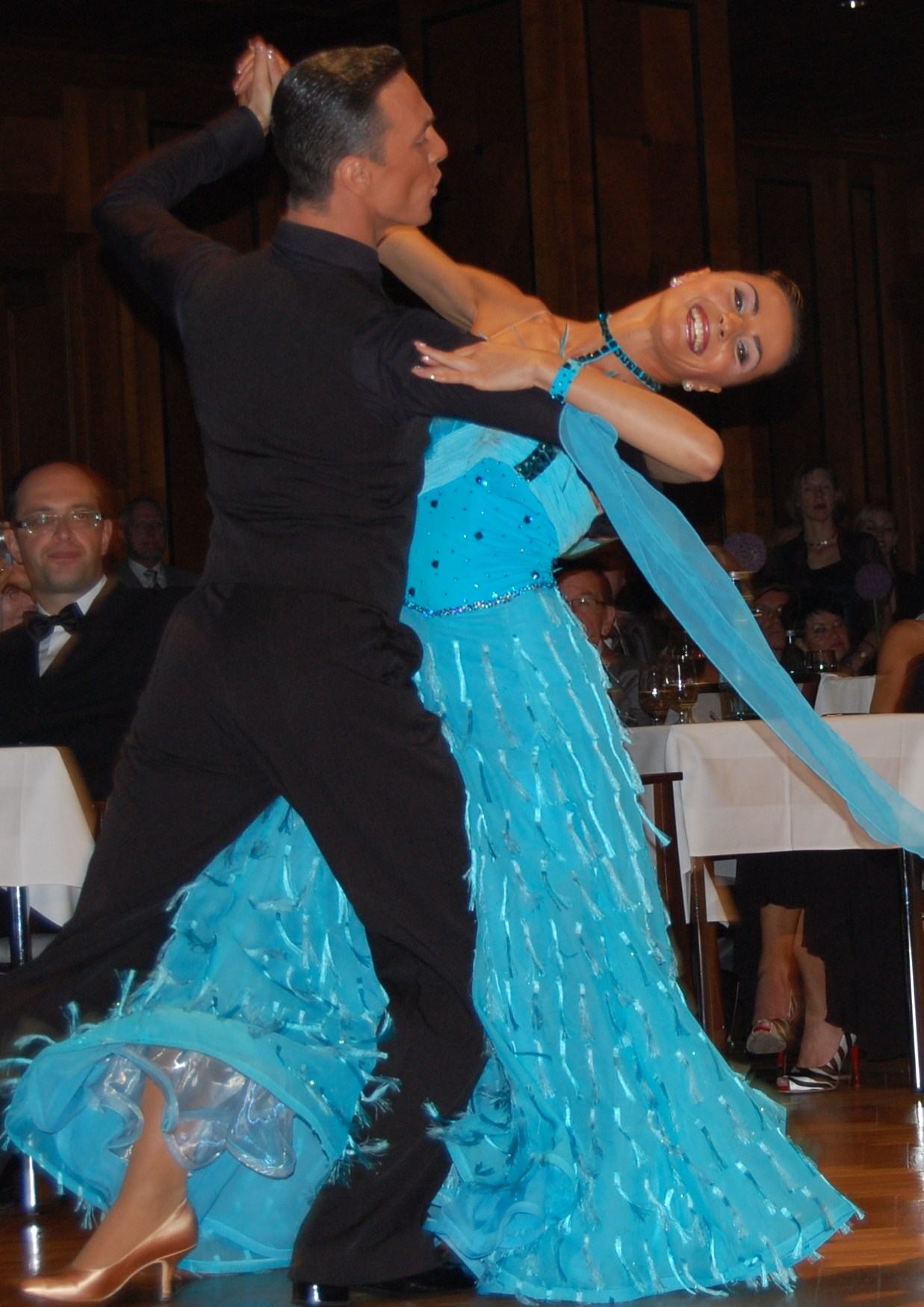 Benedetto Feruggia und Claudia Köhler, Deutsche Meister, Europa- (2009,2010) und Weltmeister (2009) der Amateure im Standardtanz (2010)